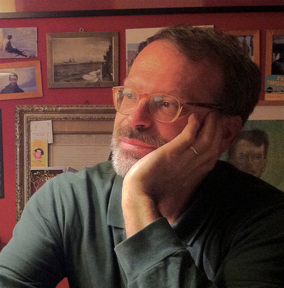 Giosuè Boetto Cohen nel suo studio a Milano, 2016. Versione 2